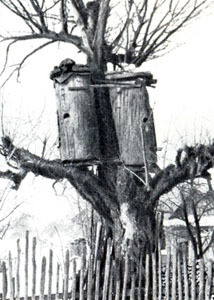 Беларуская (тарашкевіца): Выгляд калодаў, што стаялі калісь ў в. Целяшы (Гомельскі павет)